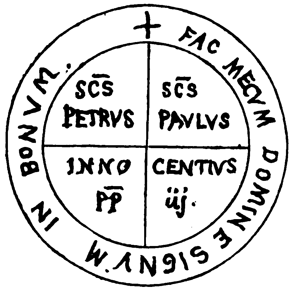 Faksimile fra P. A. Munch: Samlede Afhandlinger, bind 4, s. 443